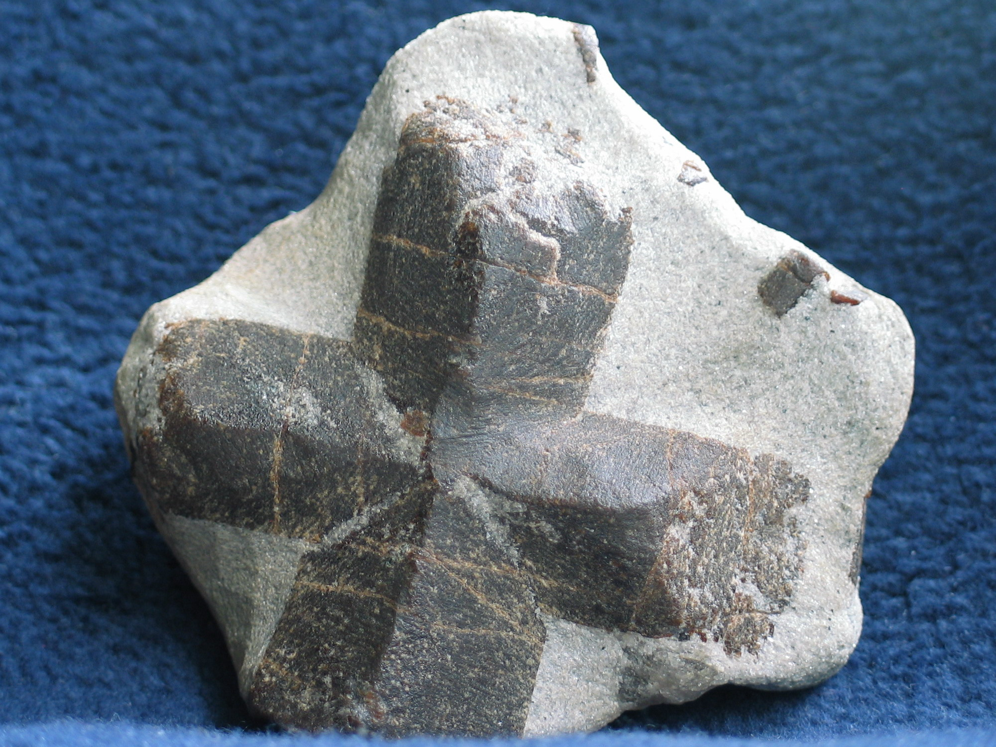 Staurolit z Półwyspu Kola w Rosji.